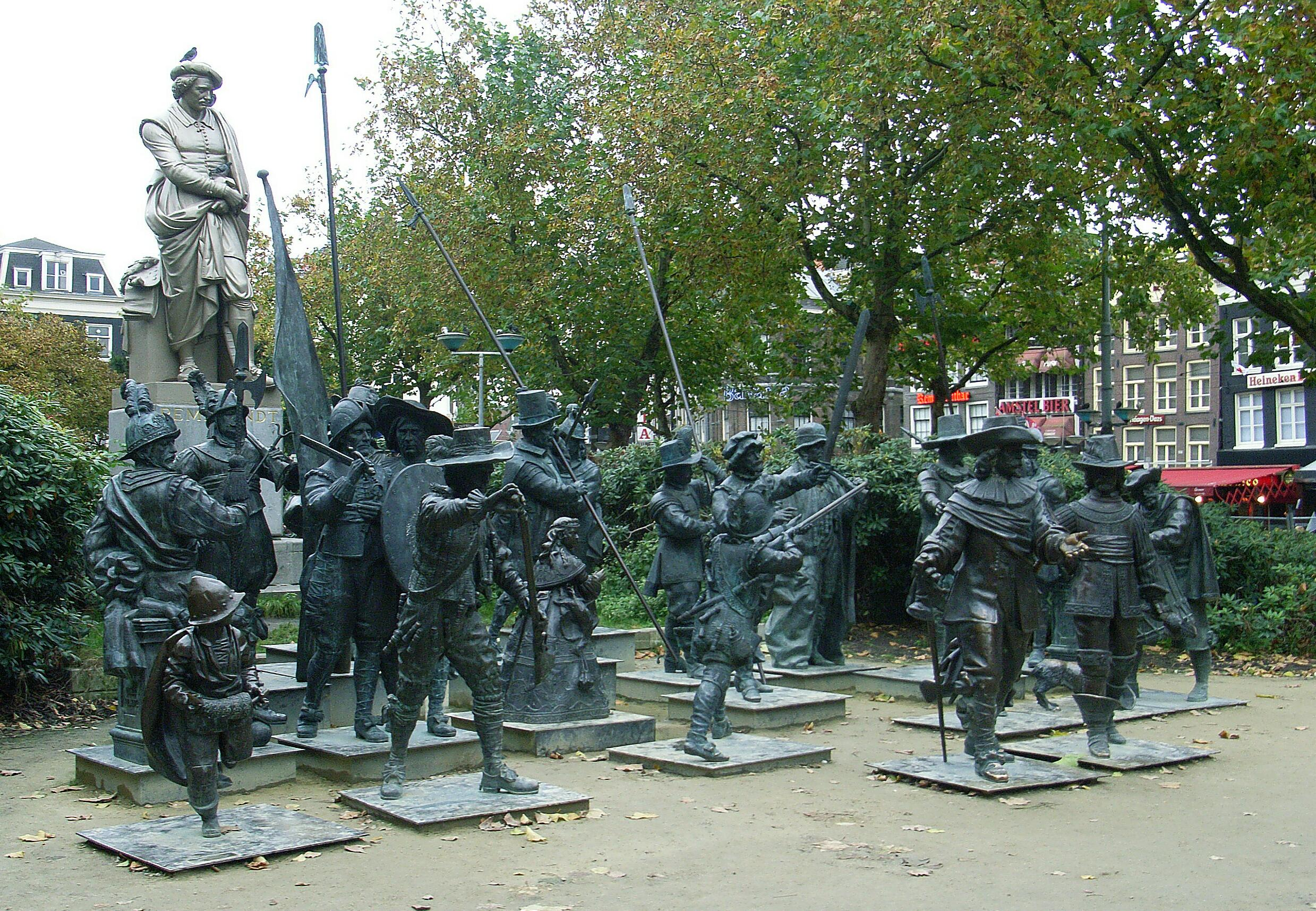 Dieses Bild zeigt Die Nachtwache (auf holl.: "De Nachtwacht") in Amsterdam. Sculptors: Alexander Taratynov (*1956 [1]) with Mikhail Dronov (*1956 [2]). [3] See also De_Nachtwacht#Trivia.